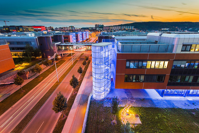 Jedna ze tří budov Jihomoravského inovačního centra: Biotechnologický inkubátor JIC INBIT v areálu Univerzitního kampusu Brno Bohunice.